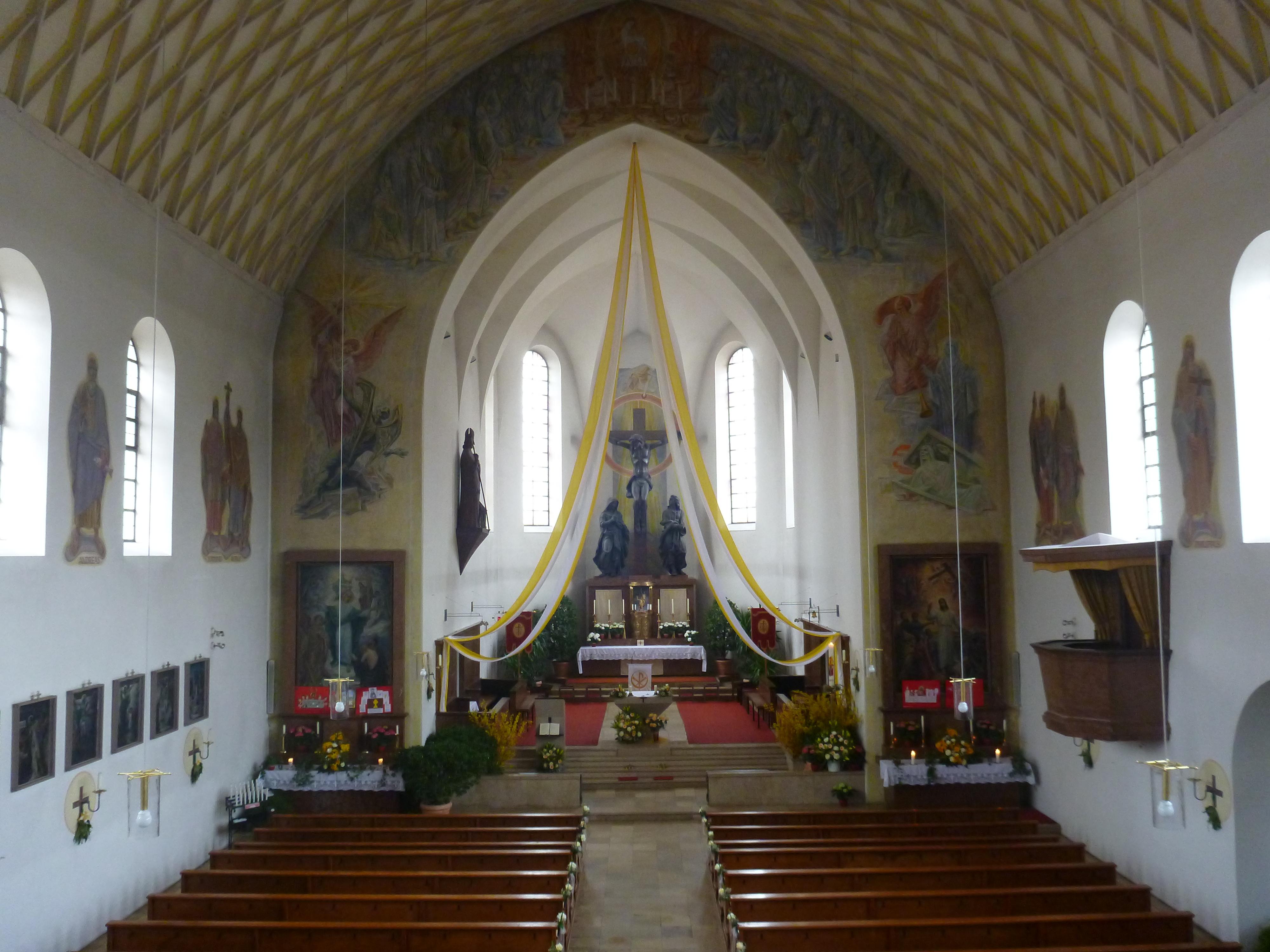 Katholische Pfarrkirche St. Wolfgang Meitingen, 1929/30 von H. Lederer erbaut; mit Ausstattung, Gemälde am Chorbogen von Karl Radinger. Innenansicht